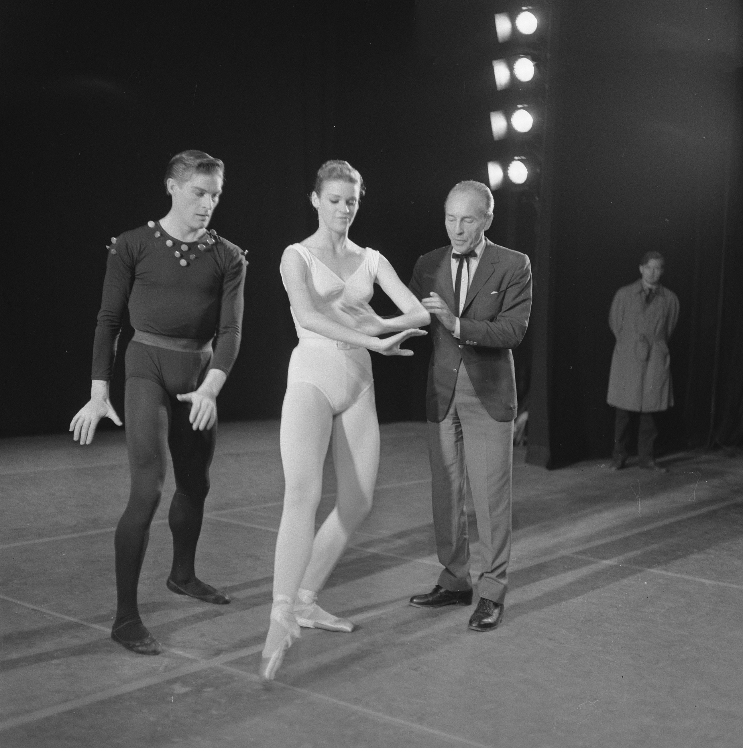 Collectie / Archief : Fotocollectie Anefo Reportage / Serie : [ onbekend ] Beschrijving : New York City Ballet in Amsterdam, repetitie New York City Ballet. Choreograaf George Balanchine geeft aanwijzingen Datum : 26 augustus 1965 Locatie : Amsterdam, Noord-Holland Trefwoorden : ballet, choreografen, repetities Persoonsnaam : Balanchine George Instellingsnaam : New York City Ballet Fotograaf : Kroon, Ron / Anefo Auteursrechthebbende : Nationaal Archief Materiaalsoort : Negatief (zwart/wit) Nummer archiefinventaris : bekijk toegang 2.24.01.03 Bestanddeelnummer : 918-1123